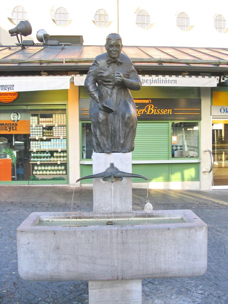 Elise-Aulinger-Brunnen auf dem Viktualienmarkt in München, von Anton Rückel (1977) (fotografiert von Ramgeis im Oktober 2004, GNU-FDL)